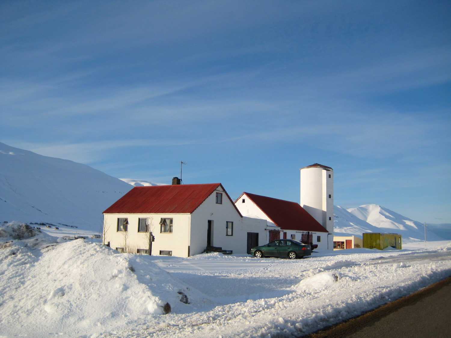 Brautarhóll í Svarfaðardal (2008)